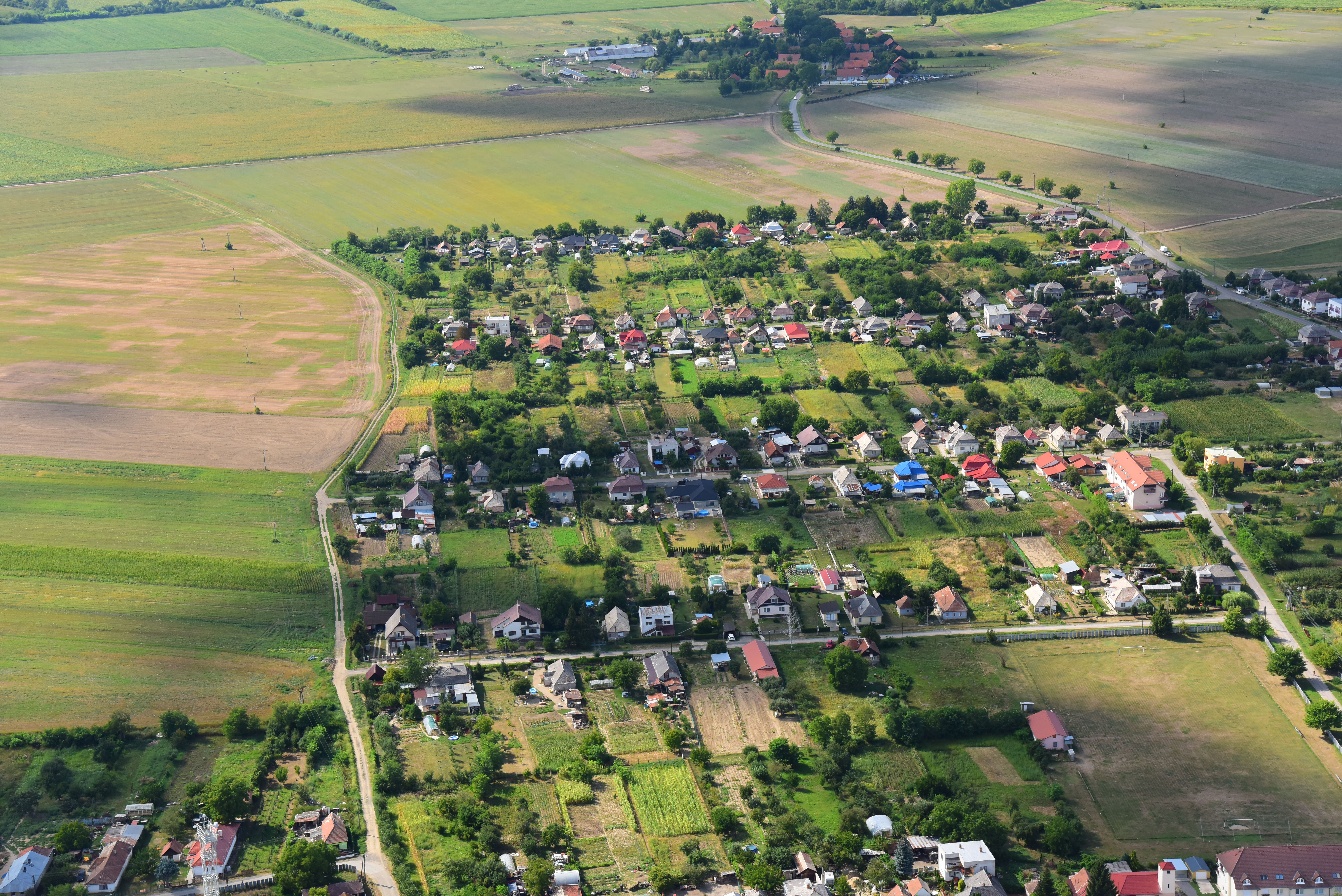 Nagytárkány látképe